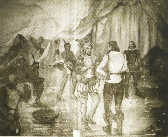 Es la fotografía de una pintura que se ubica en la presidencia municipal de Cerro de San Pedro, muestra a indígenas trabajando y a españoles contemplando las piedras de con oro, desconozco el autor de la pintura.